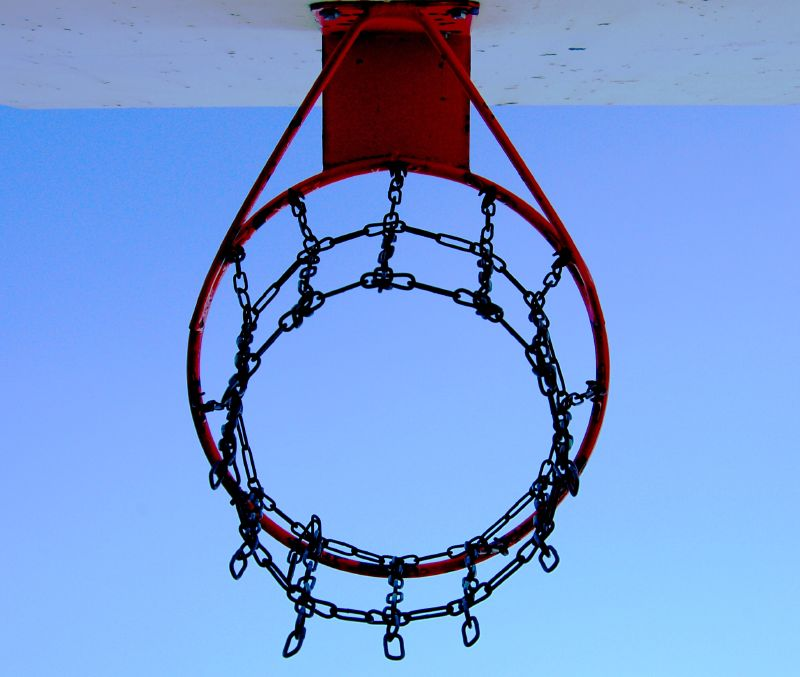 A street basketball hoop.